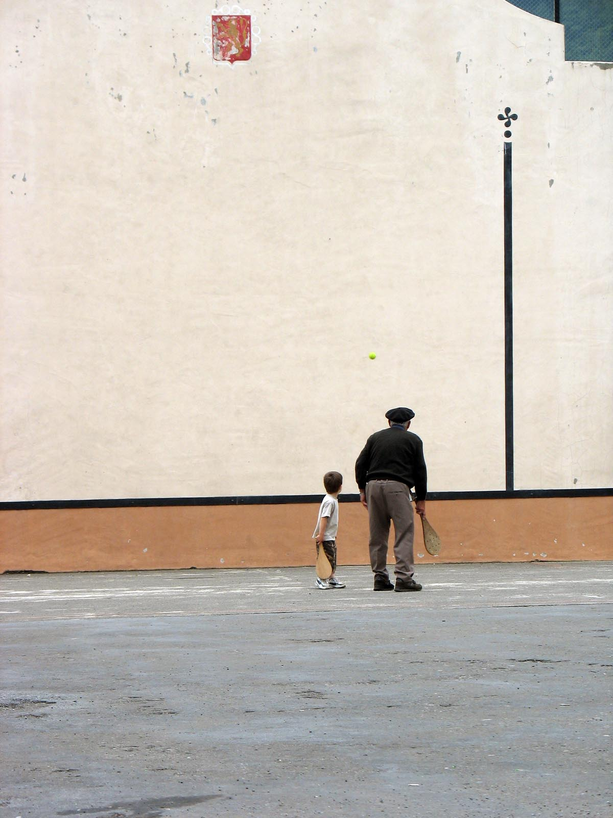 Fronton de Larrau (Pays basque, Pyrénées-Atlantiques)